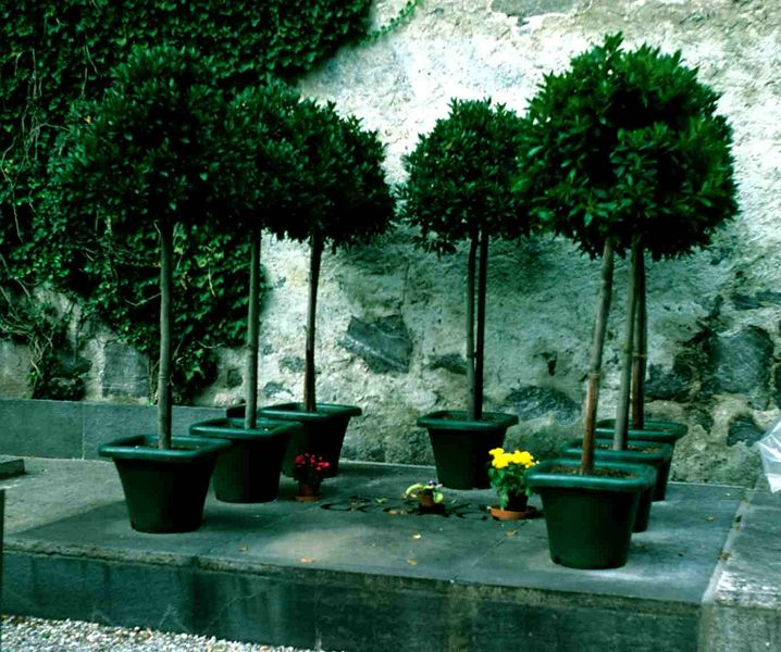 Grab von Stefan George, Friedhof von Minusio (Bezirk Locarno, Kanton Tessin, Schweiz)